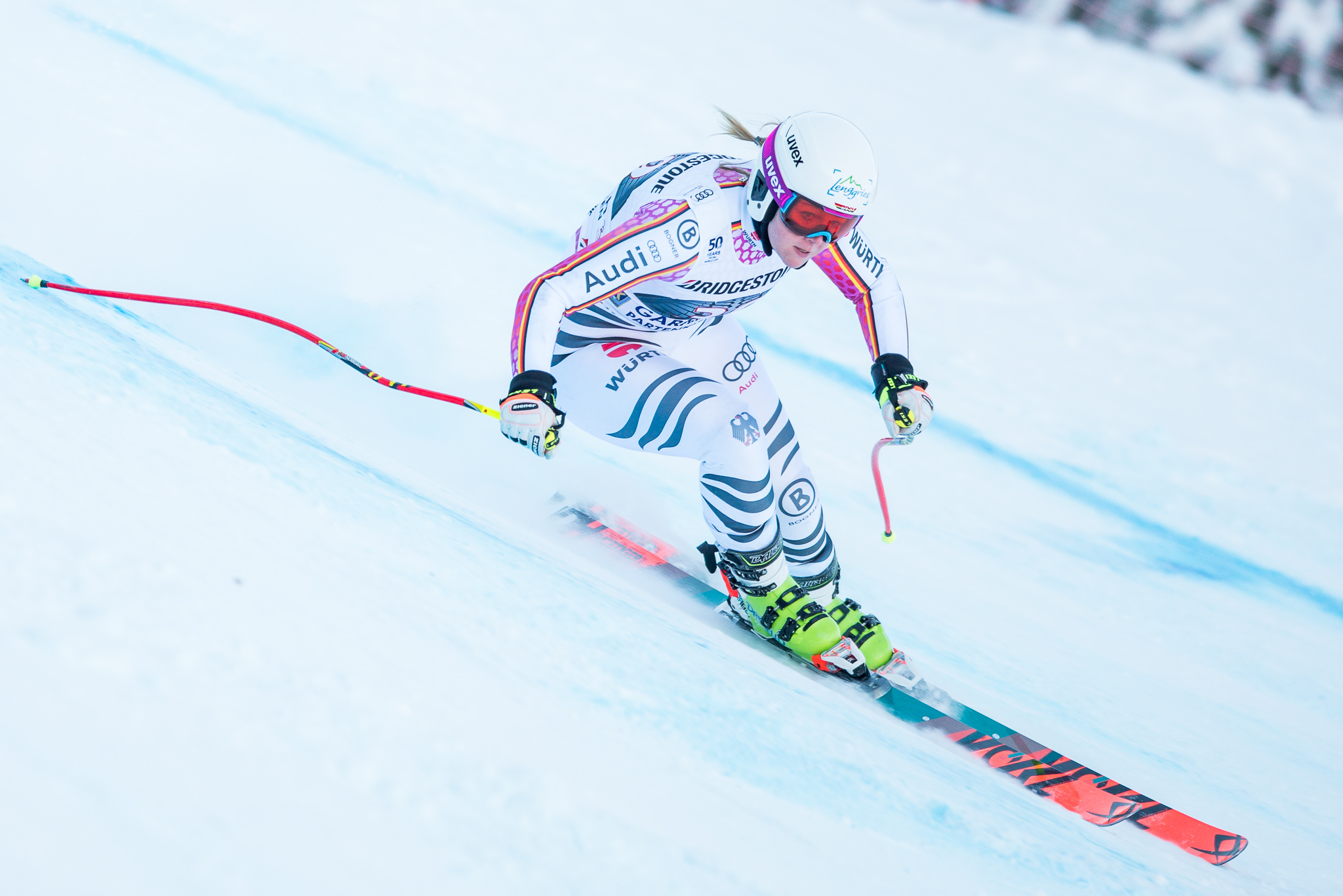 64. Kandahar Rennen,Audi FIS Ski Weltcup Garmisch-Partenkirchen,Damen Abfahrt,Kandahar,Ladies Downhill,Michaela Wenig